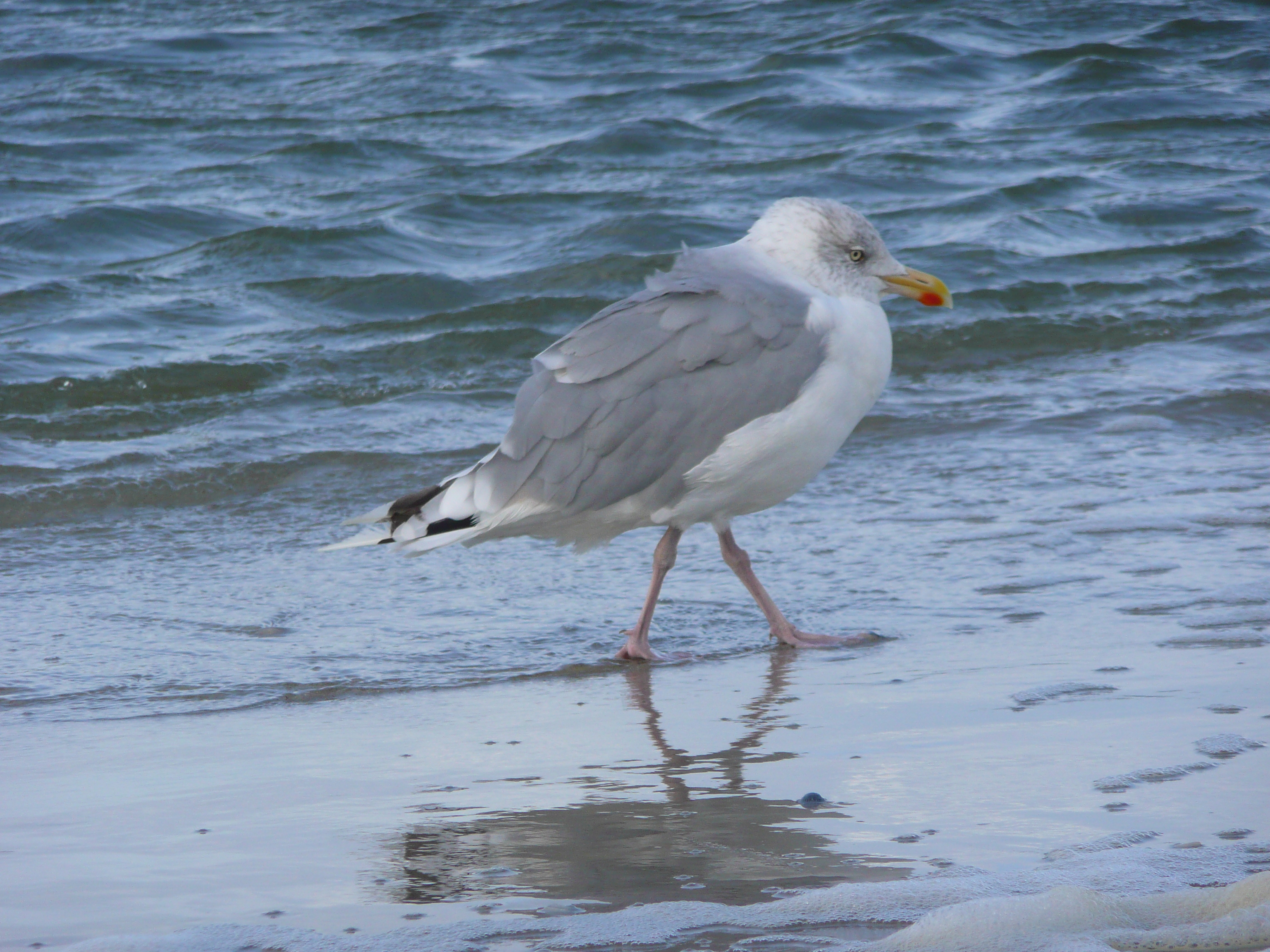 Adulte Silbermöwe (Larus argentatus), fotografiert im Watt vor der ostfriesischen Nordseeinsel Juist (Niedersachsen, Deutschland)